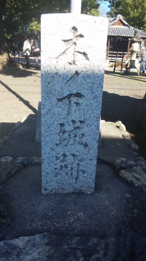 木ノ下城の碑